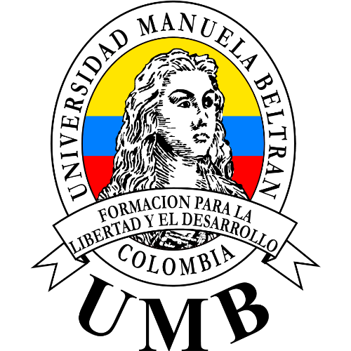 El escudo de la UMB esta representado por la figura de la heroína colombiana Manuela Beltrán, ujer humilde pero con grandes ideales de libertad, espíritu de lucha y de trabajo por el país. En el fondo se observa la bvandera de Colombia y en su entorno aparece el nombre de la instittucion.